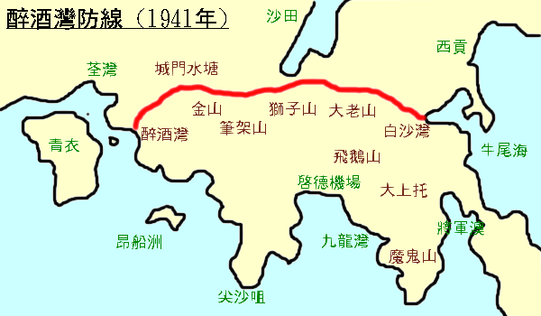 醉酒灣防線，自行繪製